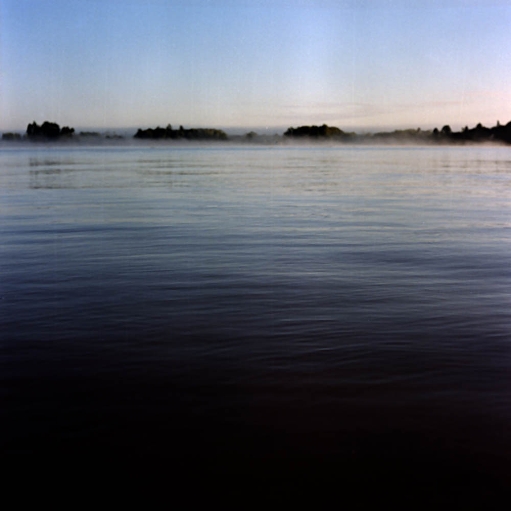 Río Paraná de las Palmas. Llamado así por las palmeras que abundaban en sus orillas. Fueron taladas y usadas para hacer postes. En su curso recibe un sunnúmero de descargas cloacales, desechos industriales y agrotóxicos. Sólo el gran caudal de agua y una "milagrosa" autodepuración evitan que se convierta en un río muerto y pestilente. Río abajo se encuentran las tomas que proveen de agua potable a las ciudades de Buenos Aires y La Plata y sus alrededores, donde vive un tercio de la población de Argentina.